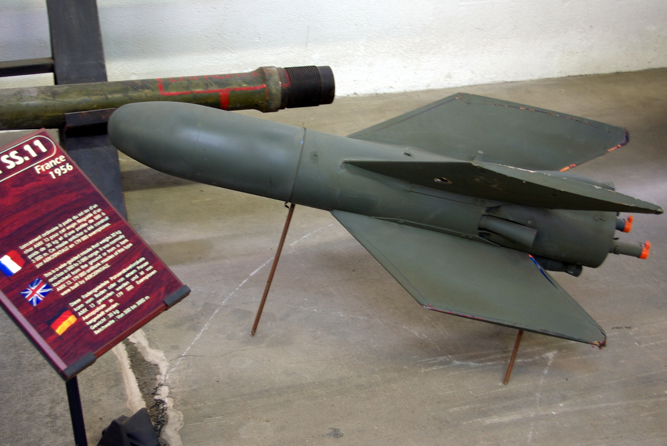 Un missile antichar Nord SS.11 exposé au Musée des BLindés de Saumur.